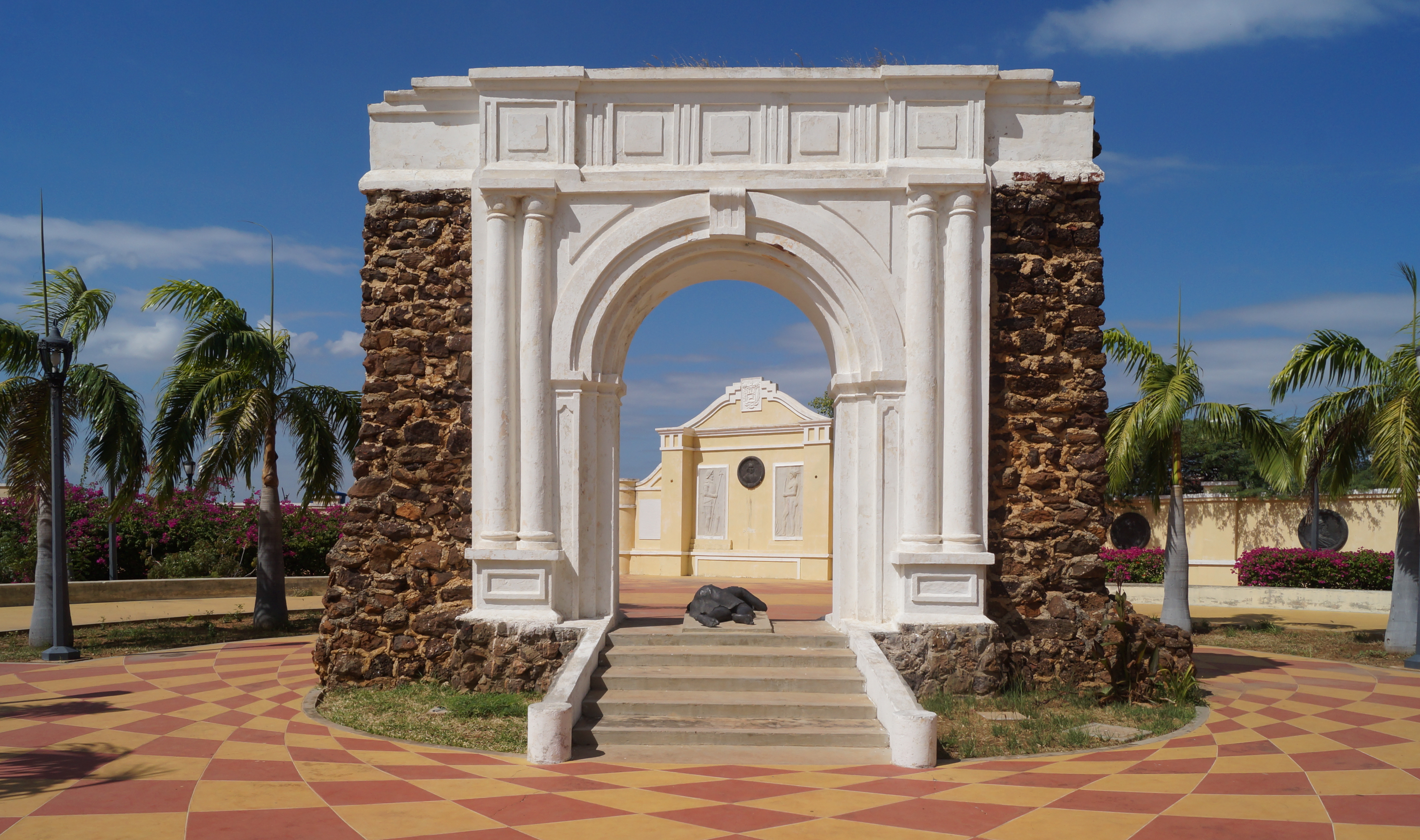 Arco Conmemorativo. Es una réplica del arco de entrada de lo que fuera la Iglesia de San Francisco, en Santo Domingo, en cuyo umbral se hizo enterrar, a su muerte en 1515, el capitán Alonso de Ojeda. Hay, igualmente una estatua de mujer yacente, muerta, debajo del arco: ese mármol representa a la india Isabel, esposa de Ojeda que murió sobre la tumba de su marido, en 1516. Maracaibo. Venezuela